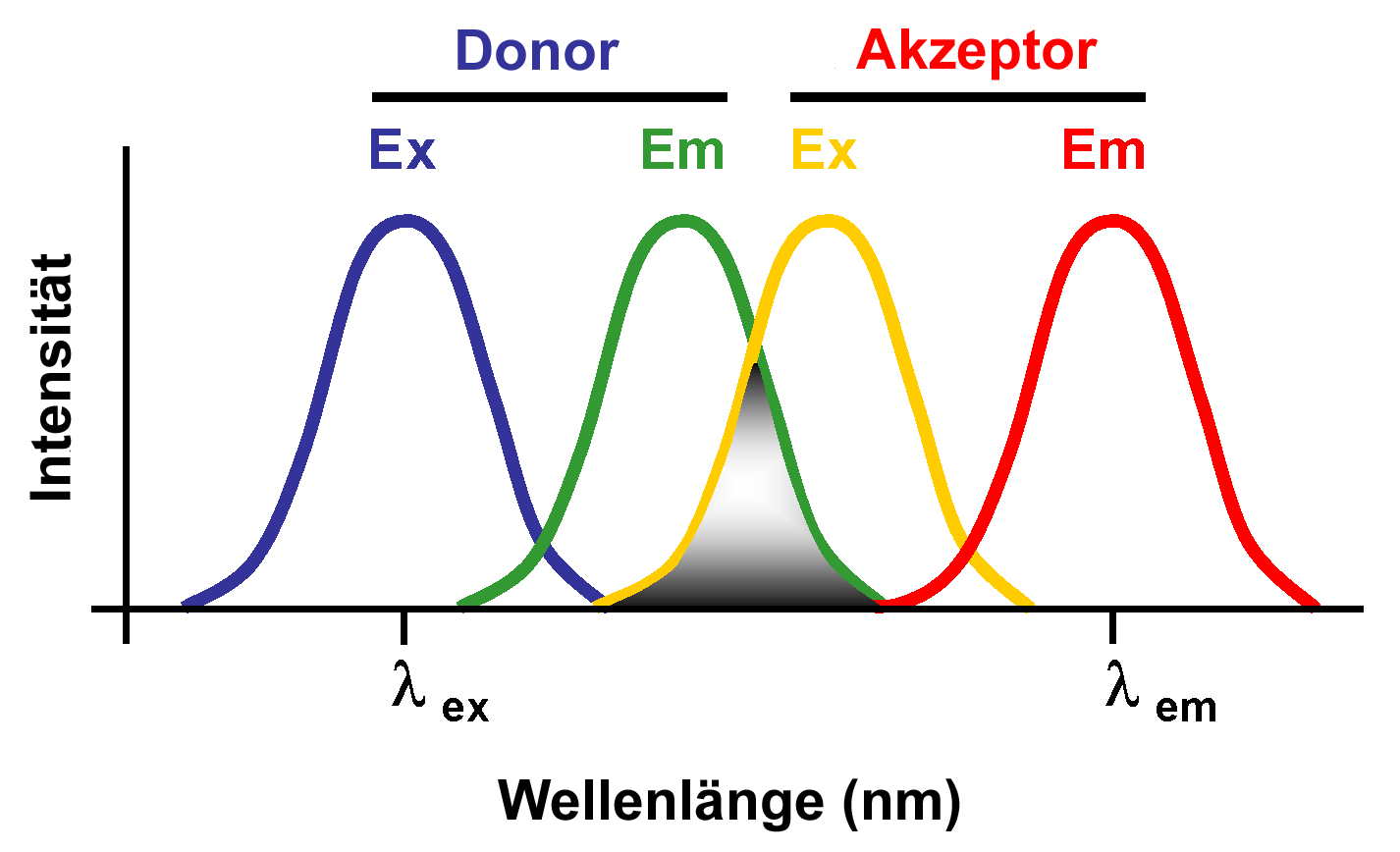 Voraussetzungen für einen Förster-Resonanzenergietransfer. Überlappung der Spektren von Donoremission und Akzeptorabsorption.